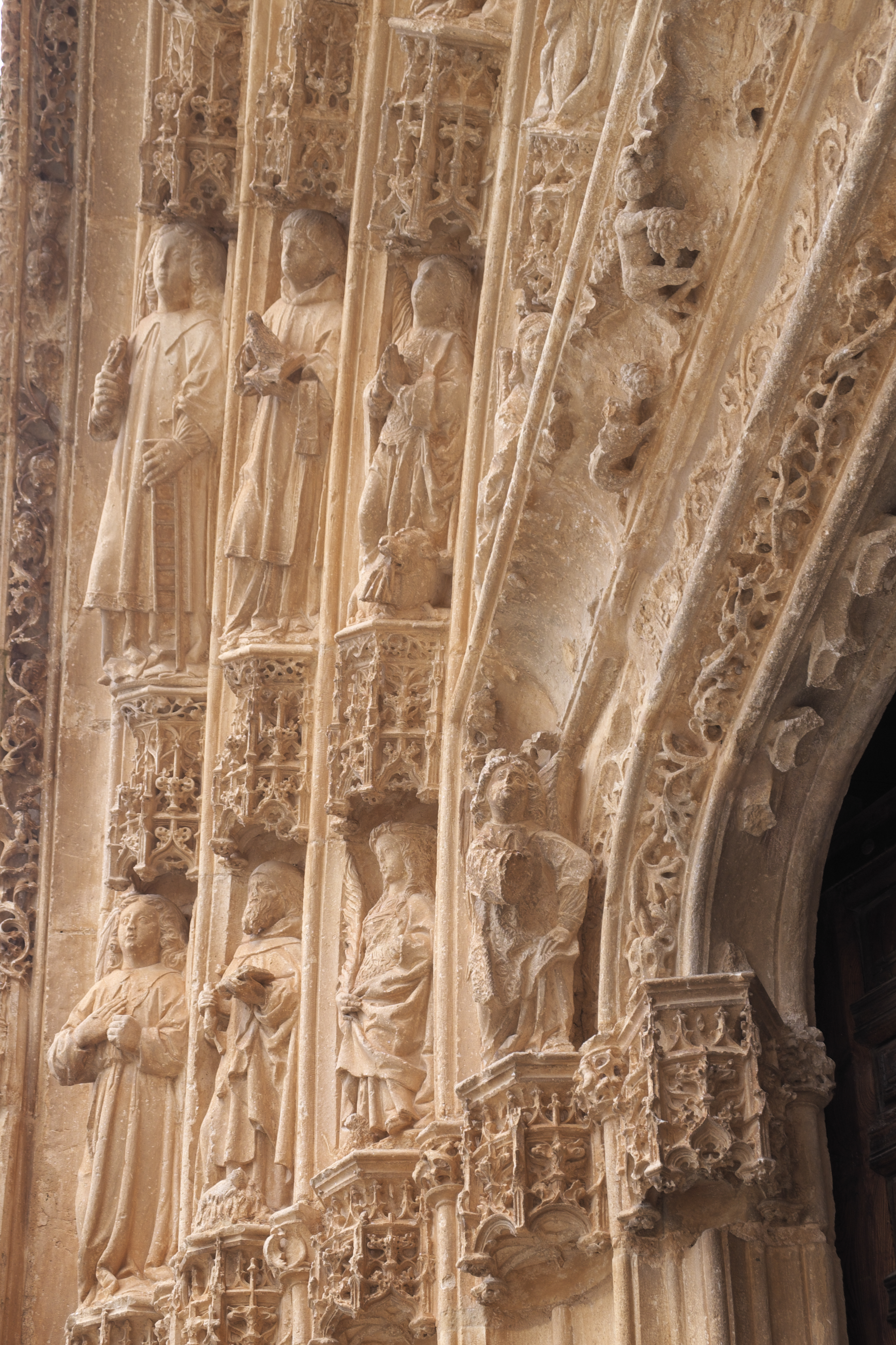 Kirche Asunción de Nuestra Señora (Mariä Himmelfahrt) in Santa María del Campo in der Provinz Burgos (Kastilien-León/Spanien), Archivolten am Nordportal